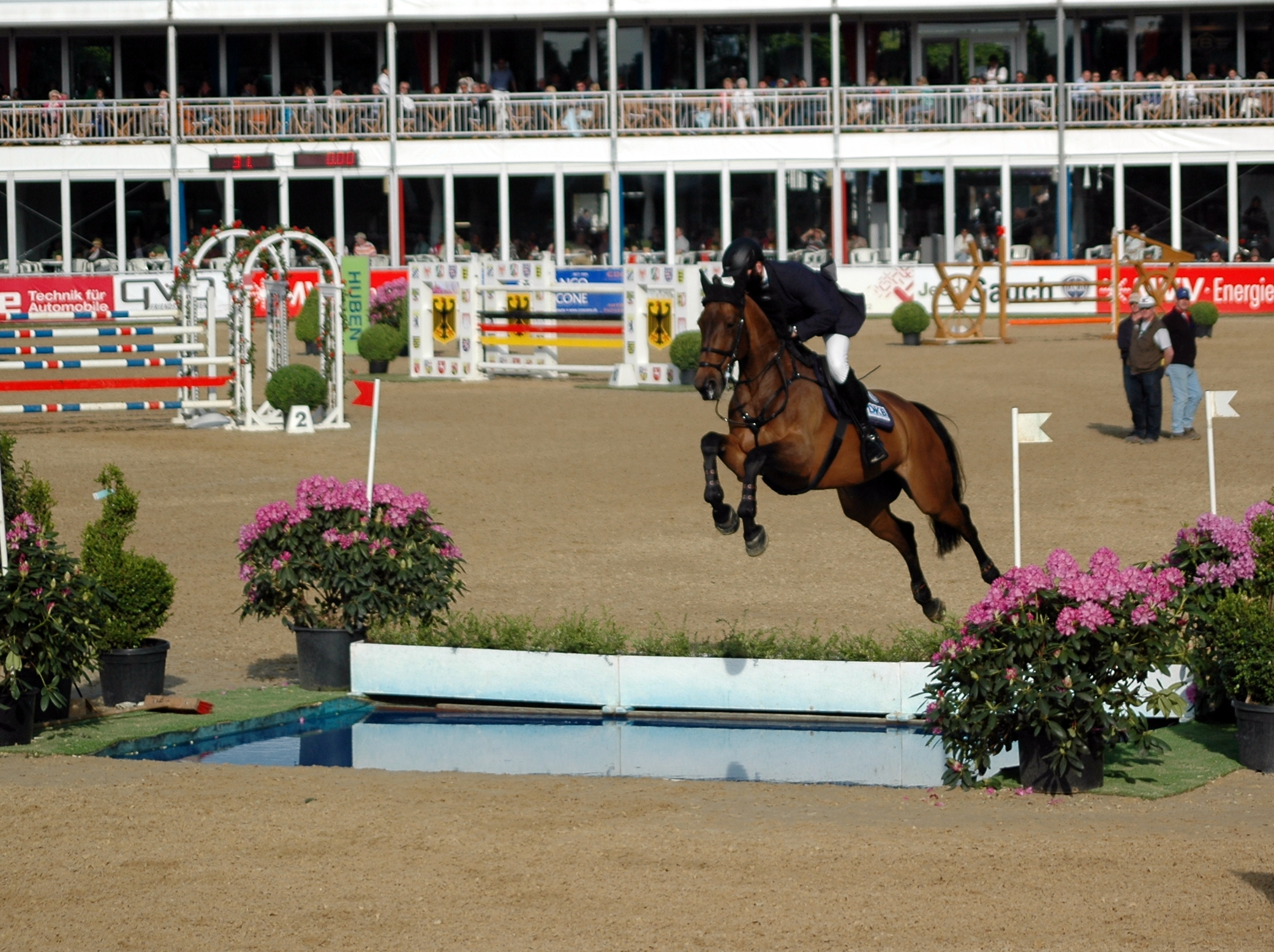 51. Maimarkt-Turnier